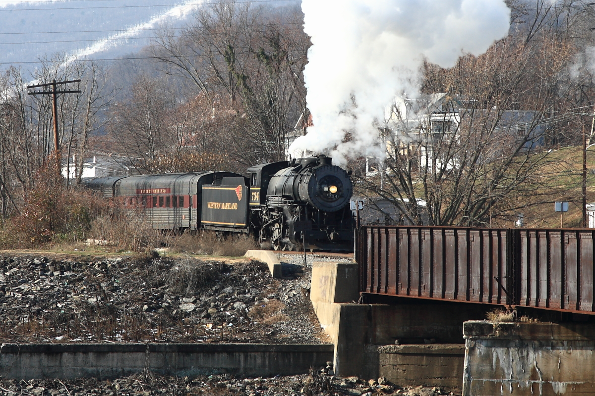 西馬里蘭觀光鐵路列車由機廠開往坎伯蘭車站